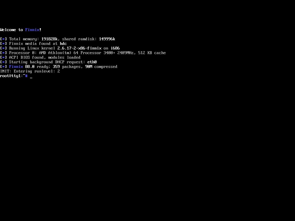 Finnix 88.0 default startup